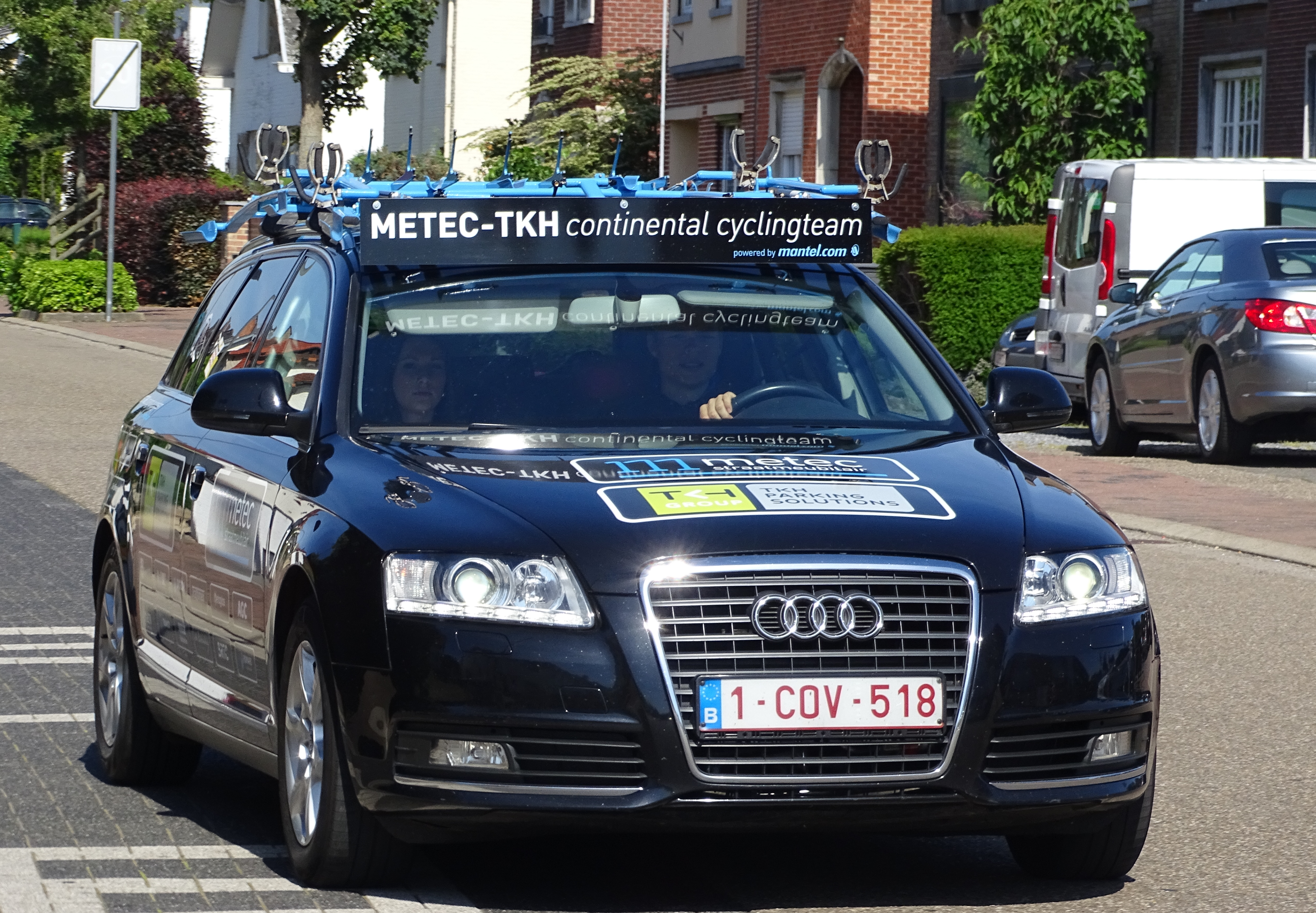 Reportage réalisé le dimanche 14 juin à l'occasion du départ et de l'arrivée du Tour du Limbourg 2015 à Tongres, Belgique.